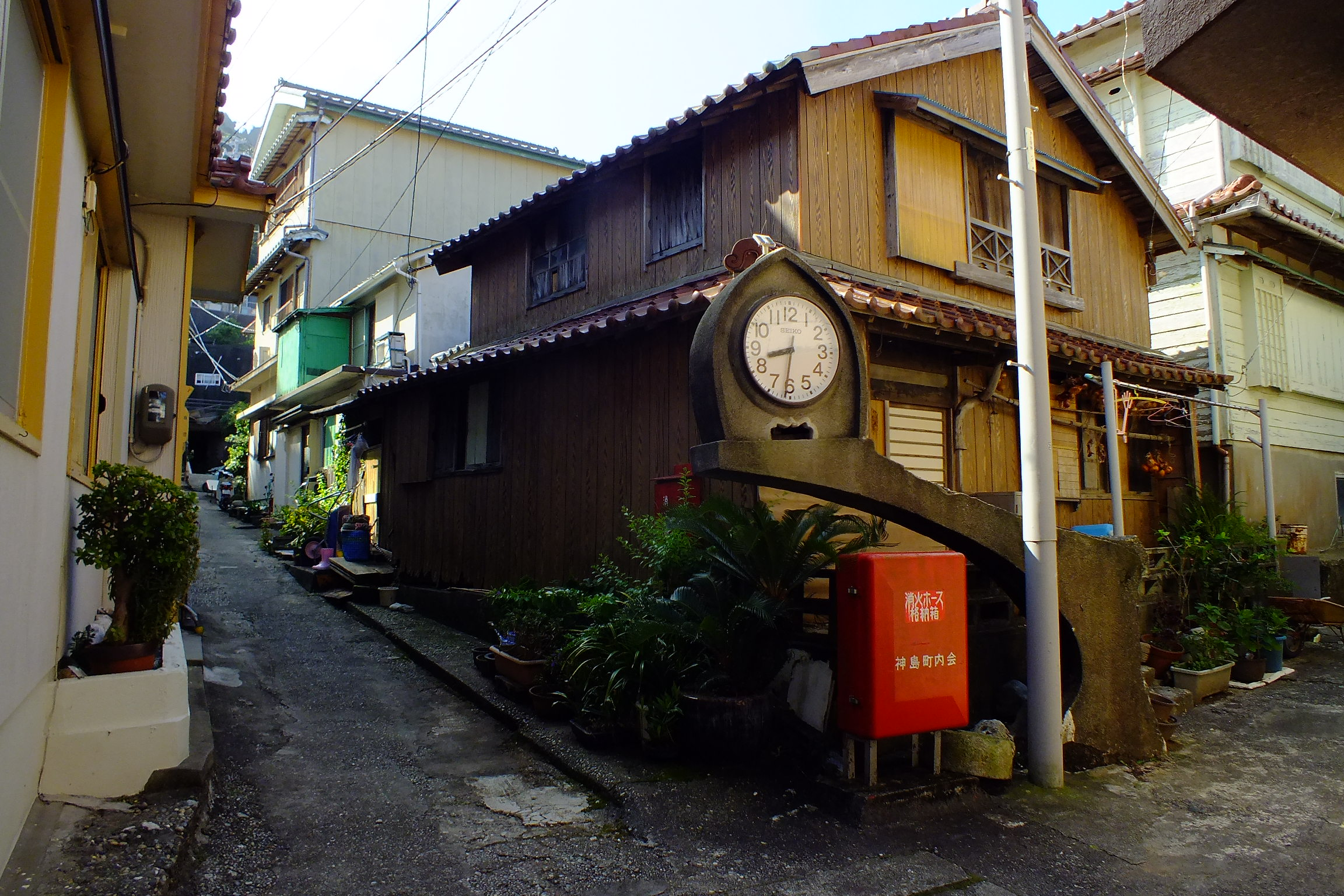 2016-08-05 Kami Island (Mie) 神島民家・路地 時計台